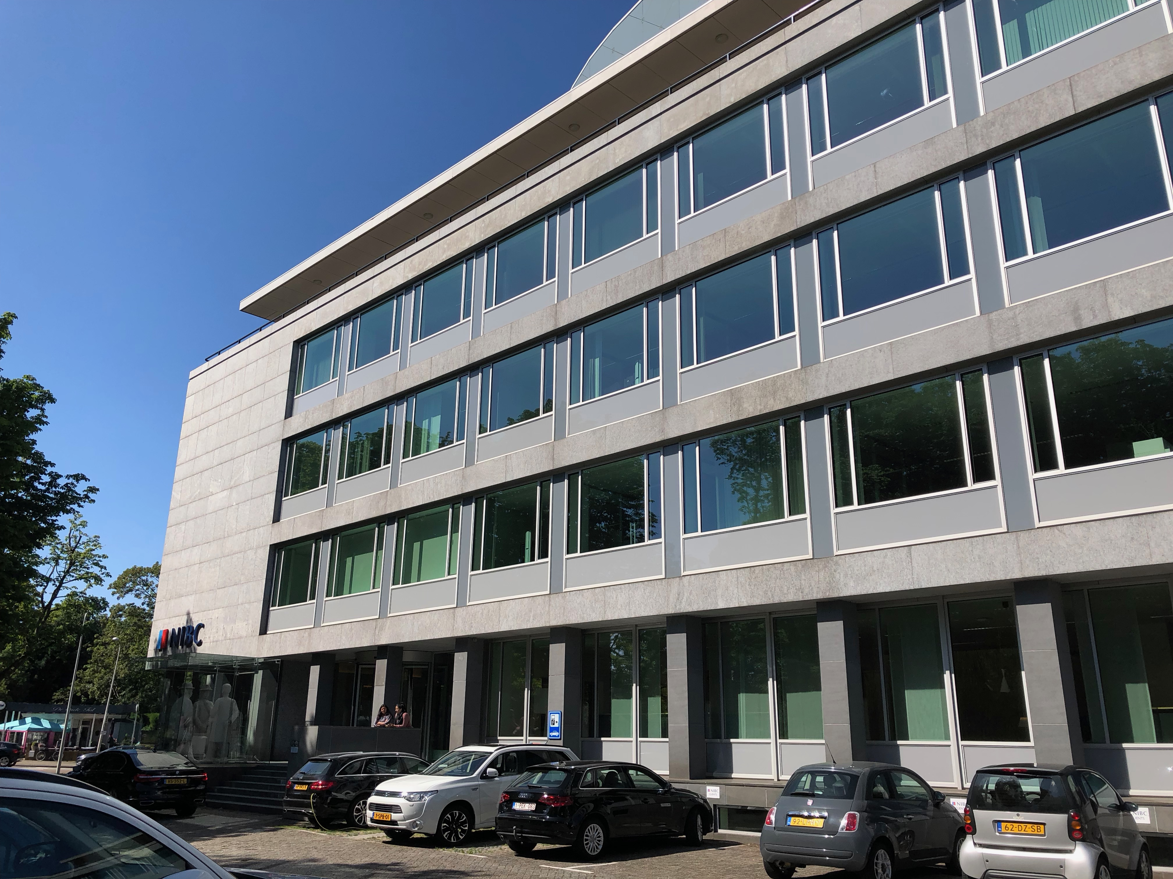 op plek van Kleykamp